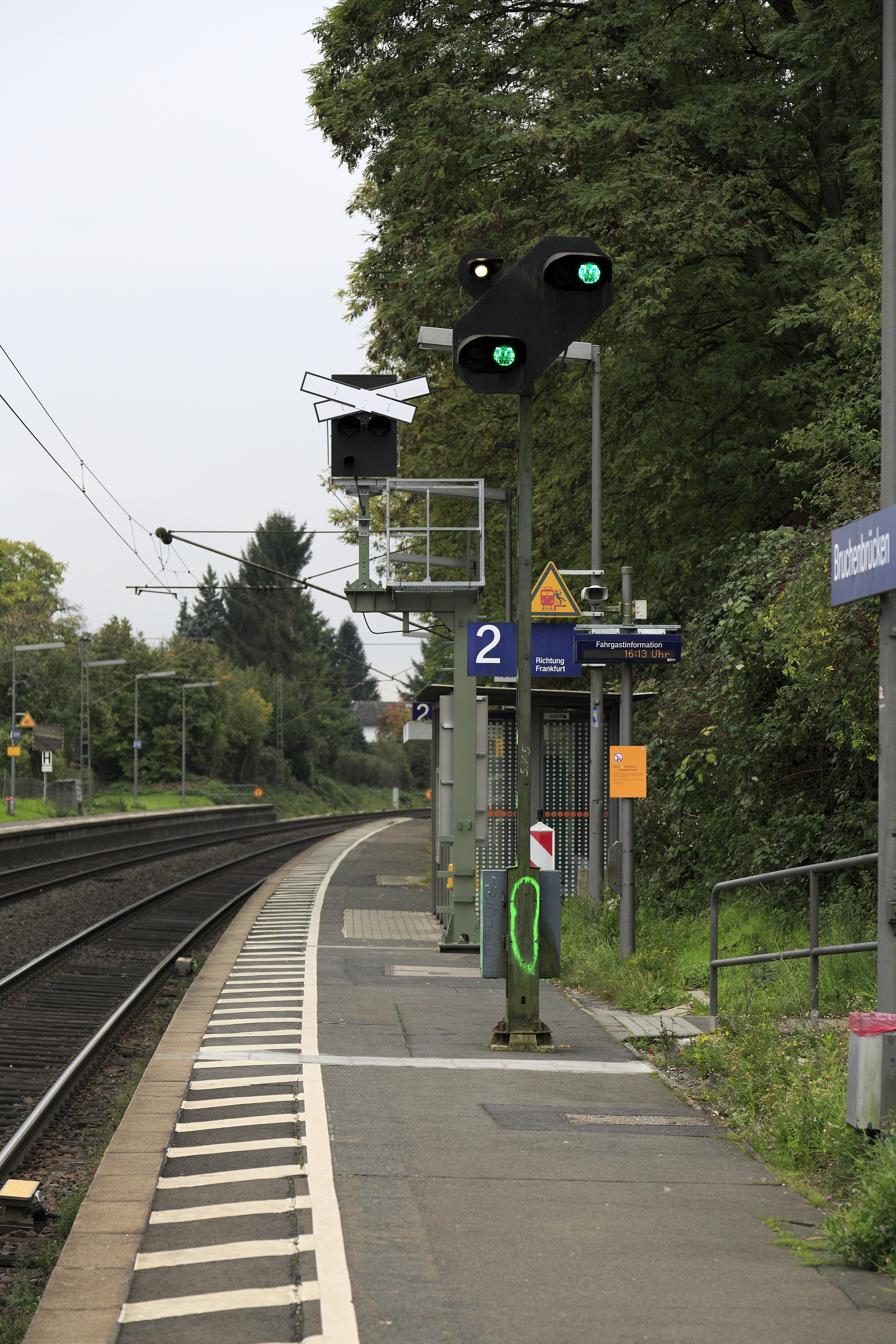 Richtung Nieder-Wöllstadt und Frankfurt (M), die Signale sind Vorsignalwiederholer für das letzte Blocksignal vor Nieder-Wöllstadt.